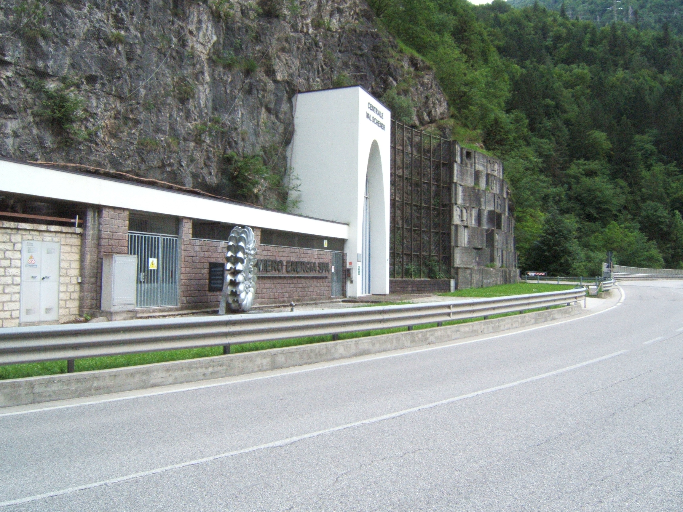 Ohannés Gurekian - Centrale idroelettrica di Val Schener - 1961